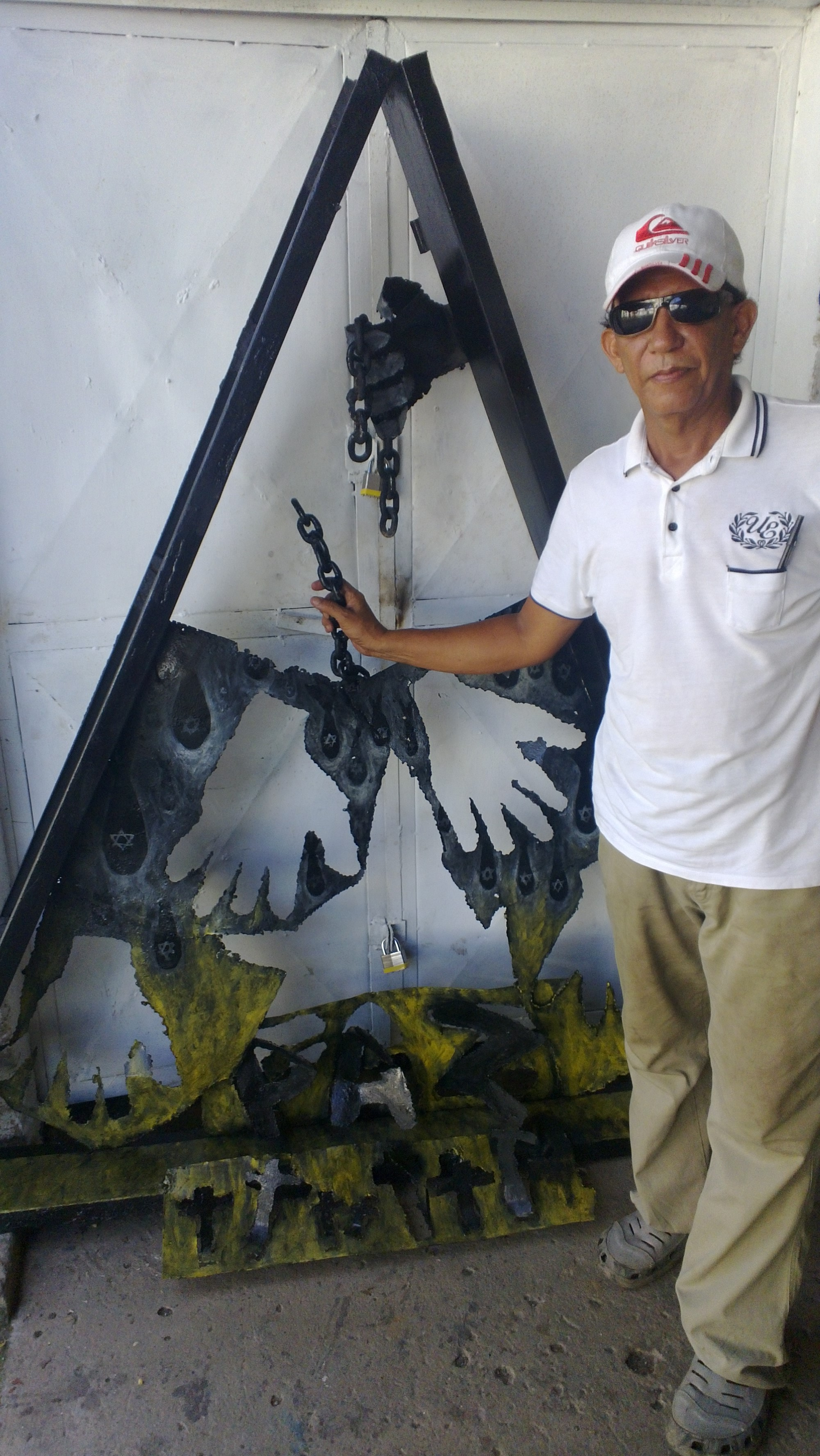 Waykeri Rawlinson, Maestro de las artes plasticas modernas. 2016